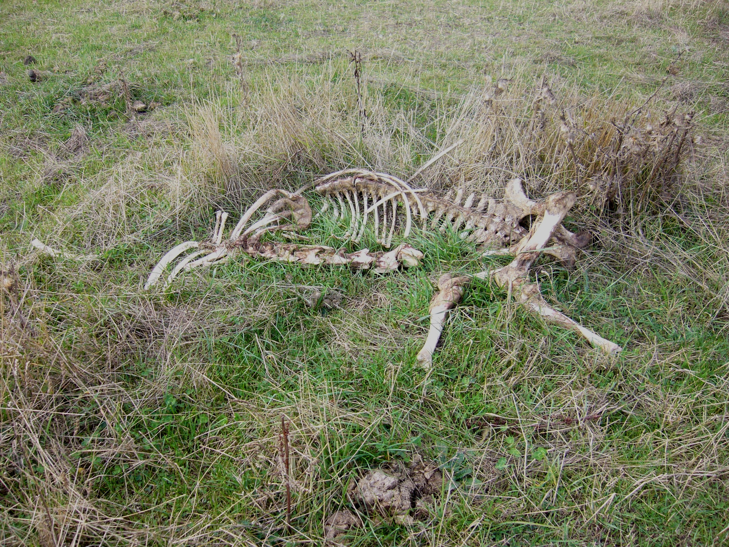 Moxal baten hezurrak